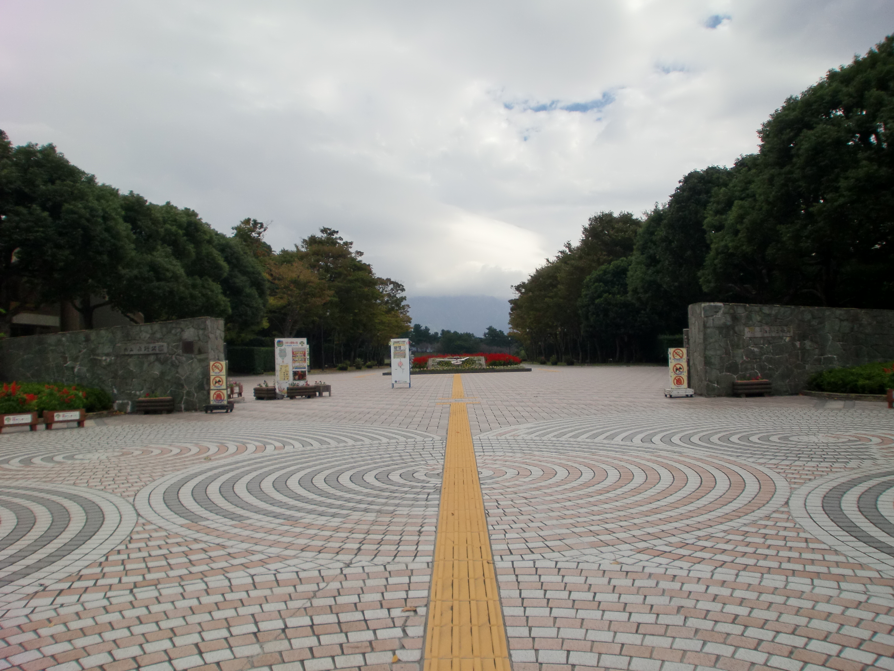 鹿児島県立吉野公園の入口。